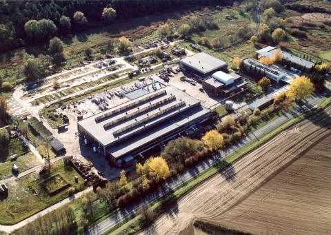 Pusztaszemes, Hungary, aerialphotography